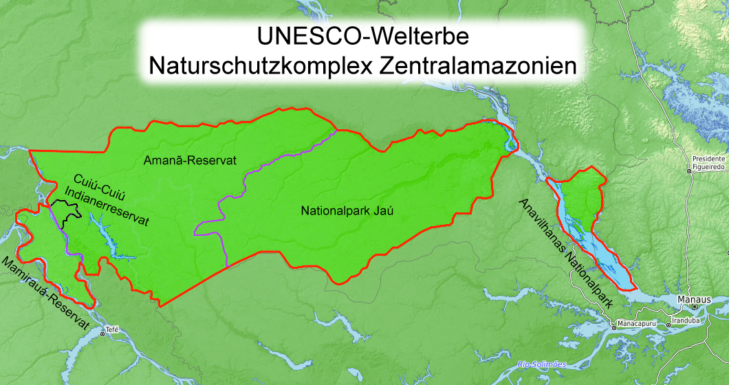 Karte des UNESCO-Welterbes "Naturschutzkomplex Zentralamazonien"